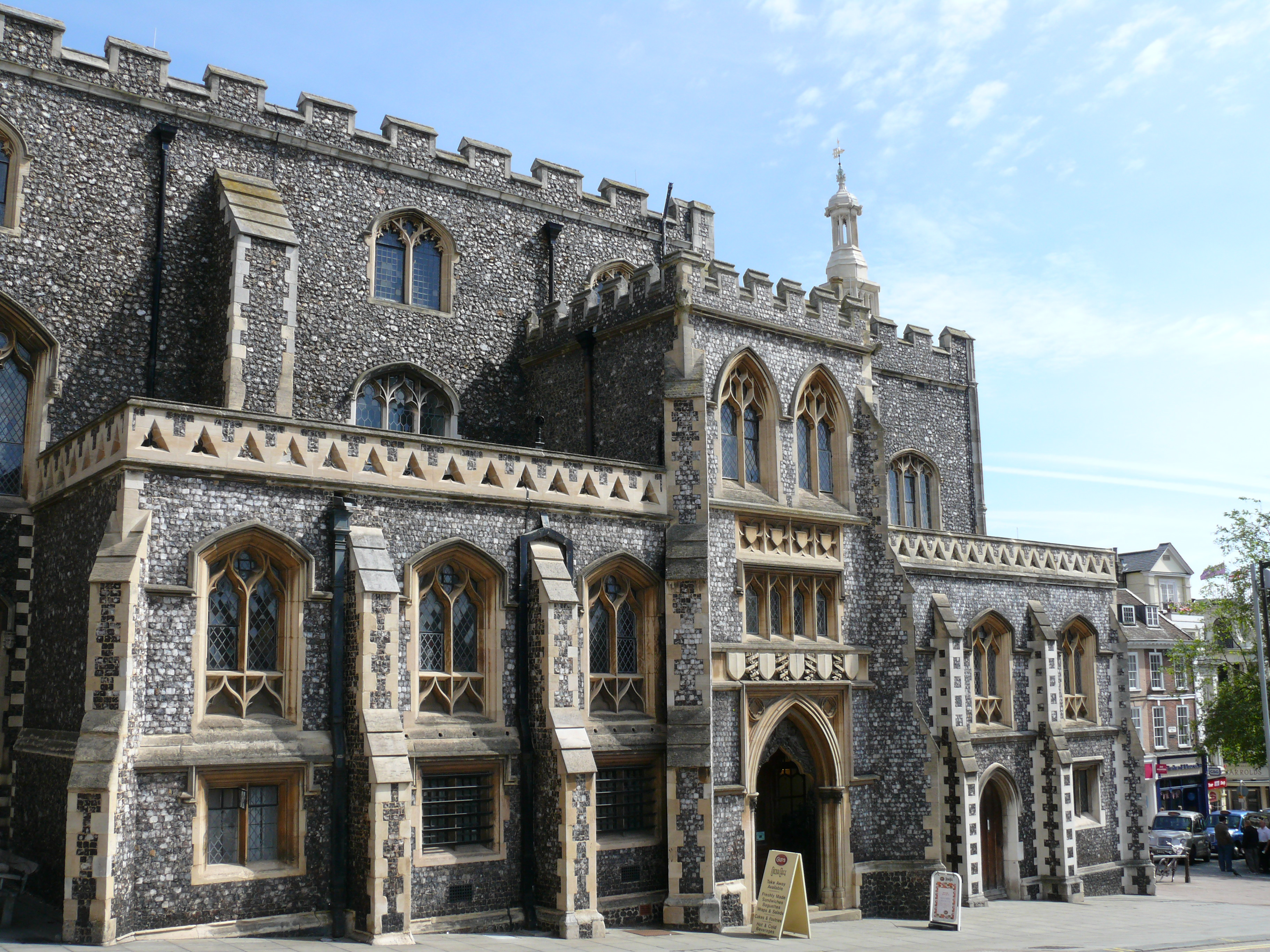 Norwich